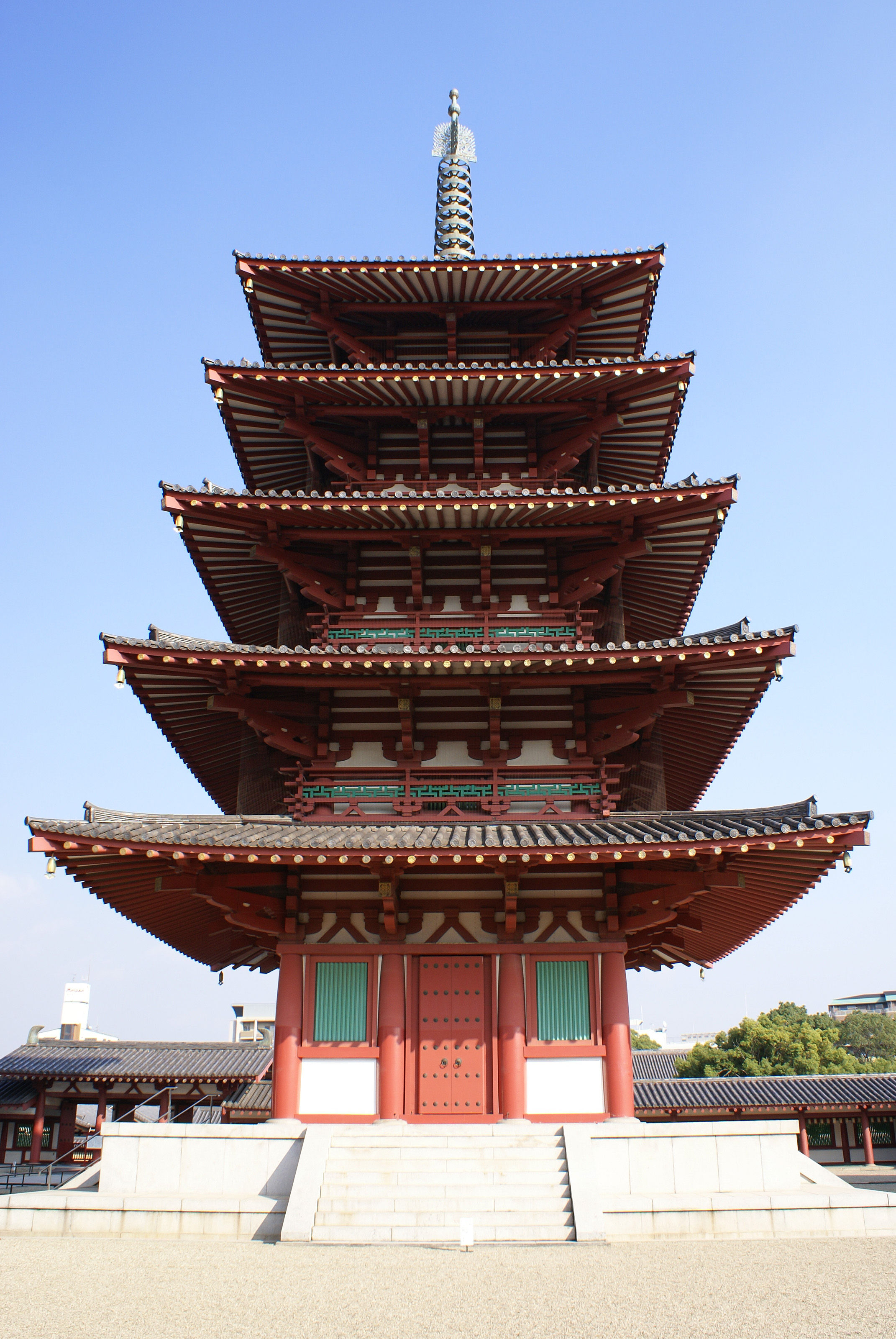 Shitennō-ji in Osaka, Japan